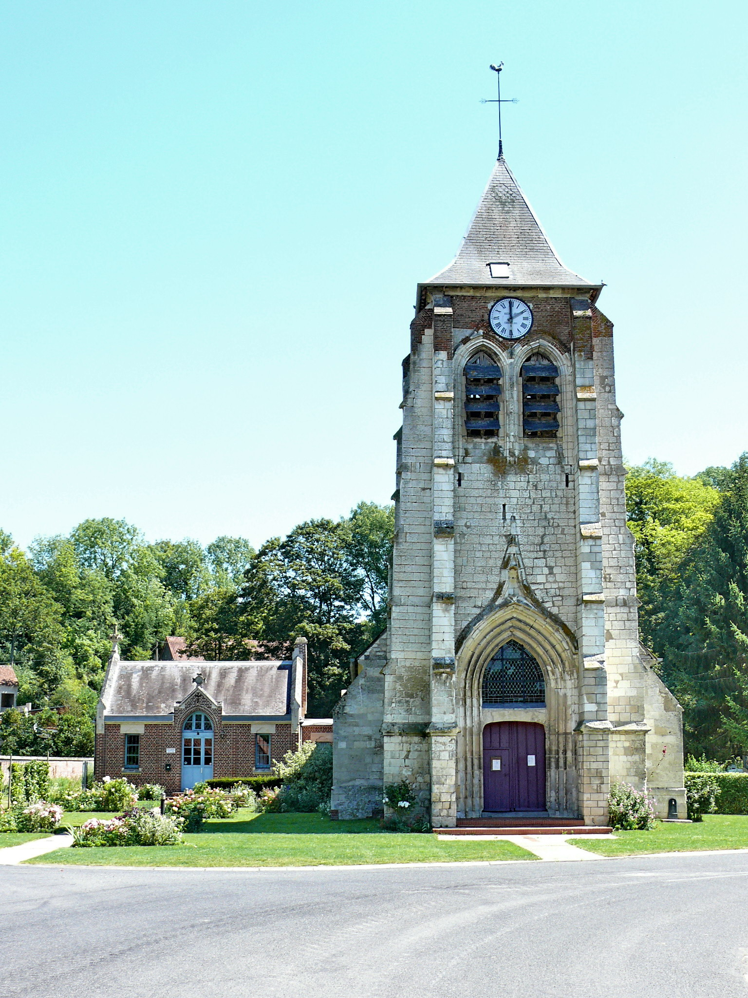 Monsures : L'église Saint Léger et la sacristie, utilisée par la commune comme Mairie depuis 1998.